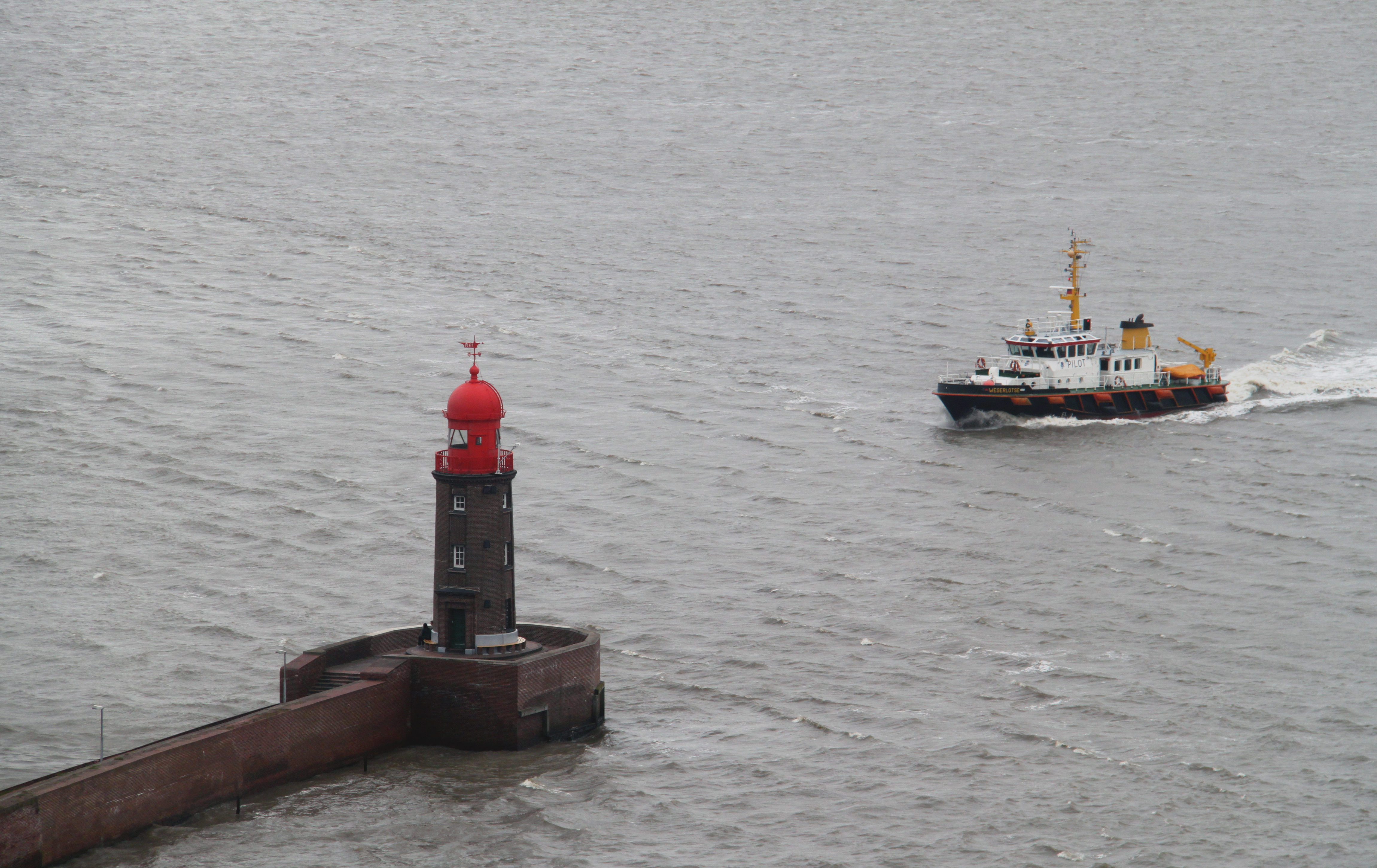 Mole und Leuchtfeuer der Geesteeinfahrt. Bremerhaven 2010, Blick vom Richtfunkturm, Leuchtturm und WeserlotseDas abgebildete Objekt ist ein geschütztes Kulturdenkmal in der Freien Hansestadt Bremen, mit der Nr. 1636 beim Landesamt für Denkmalpflege registriert.